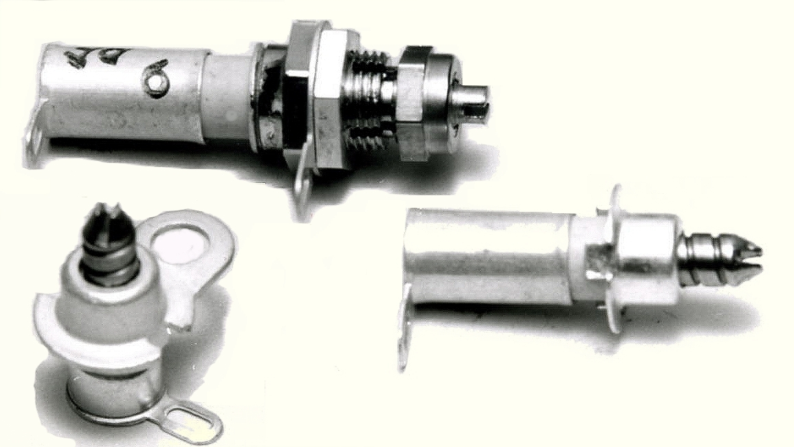 Keramische Rohrtrimmer